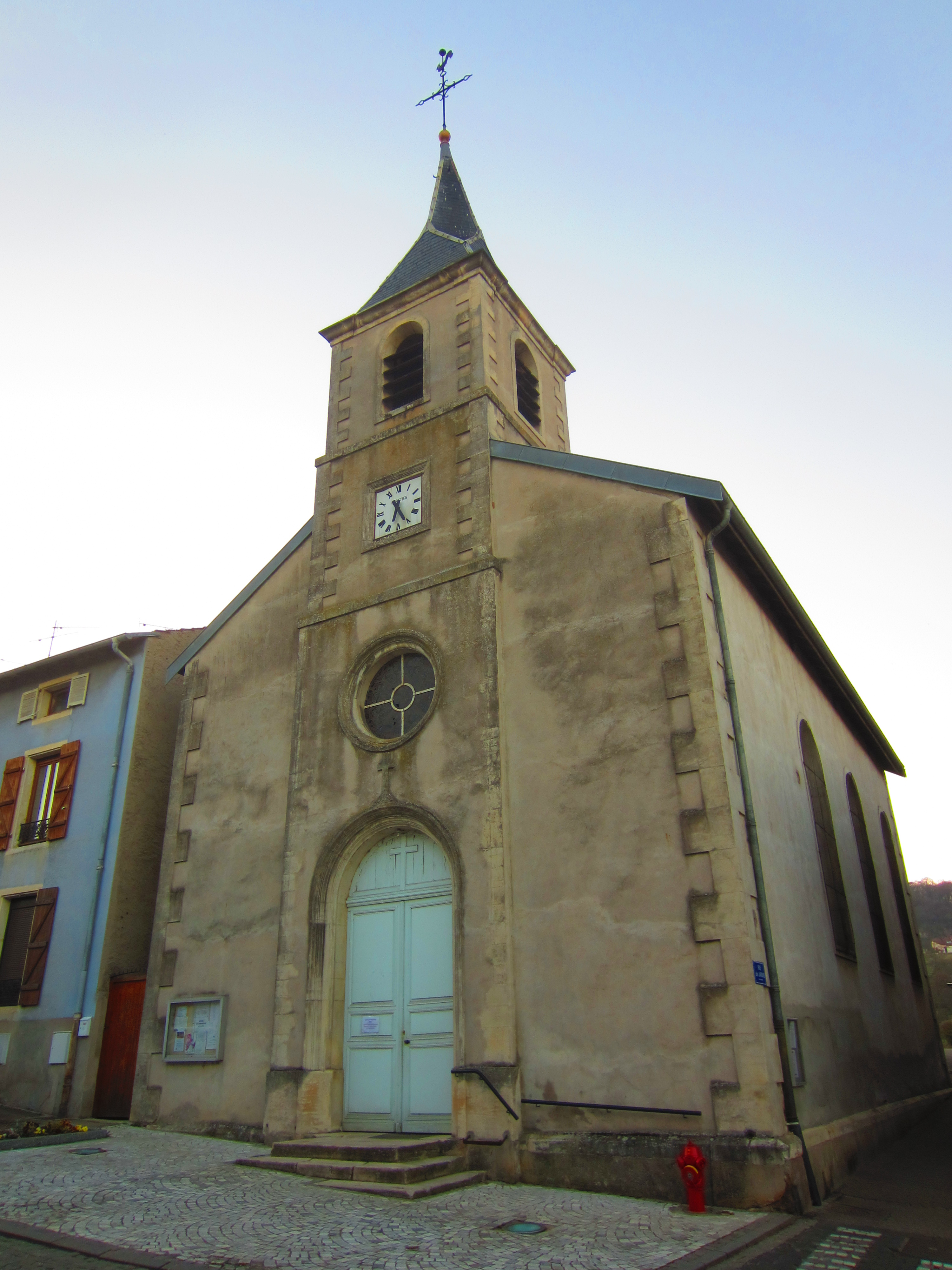 Houdemont eglise